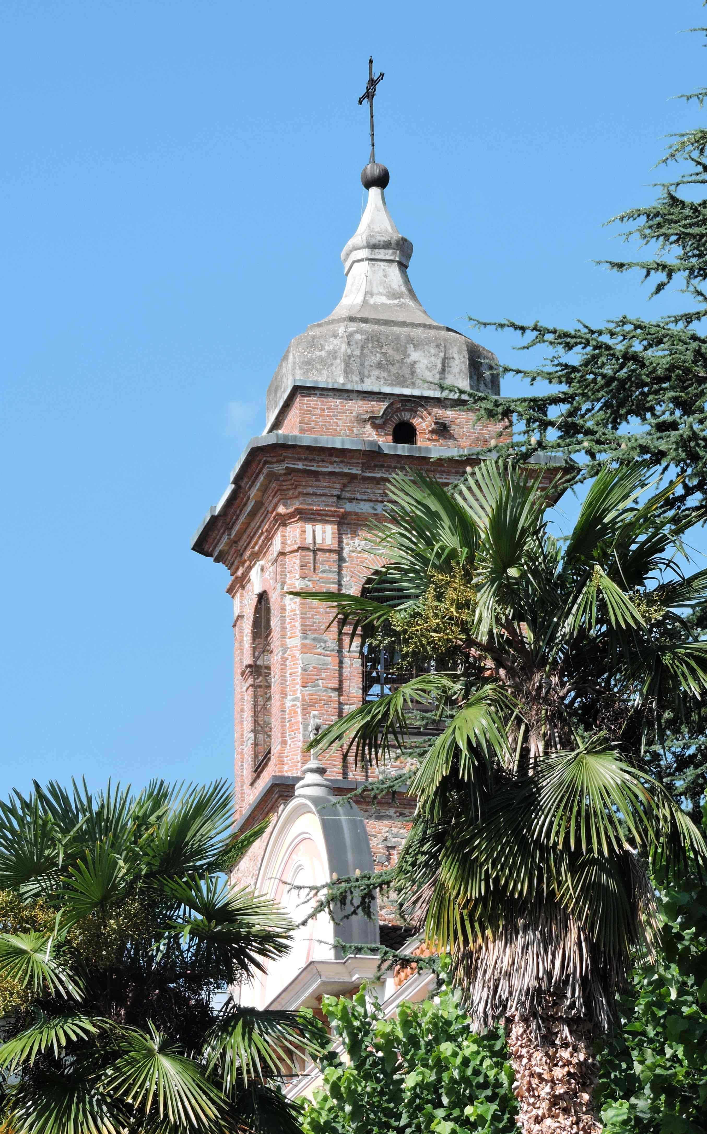 Graglia (BI): il campanile di Santa Fede